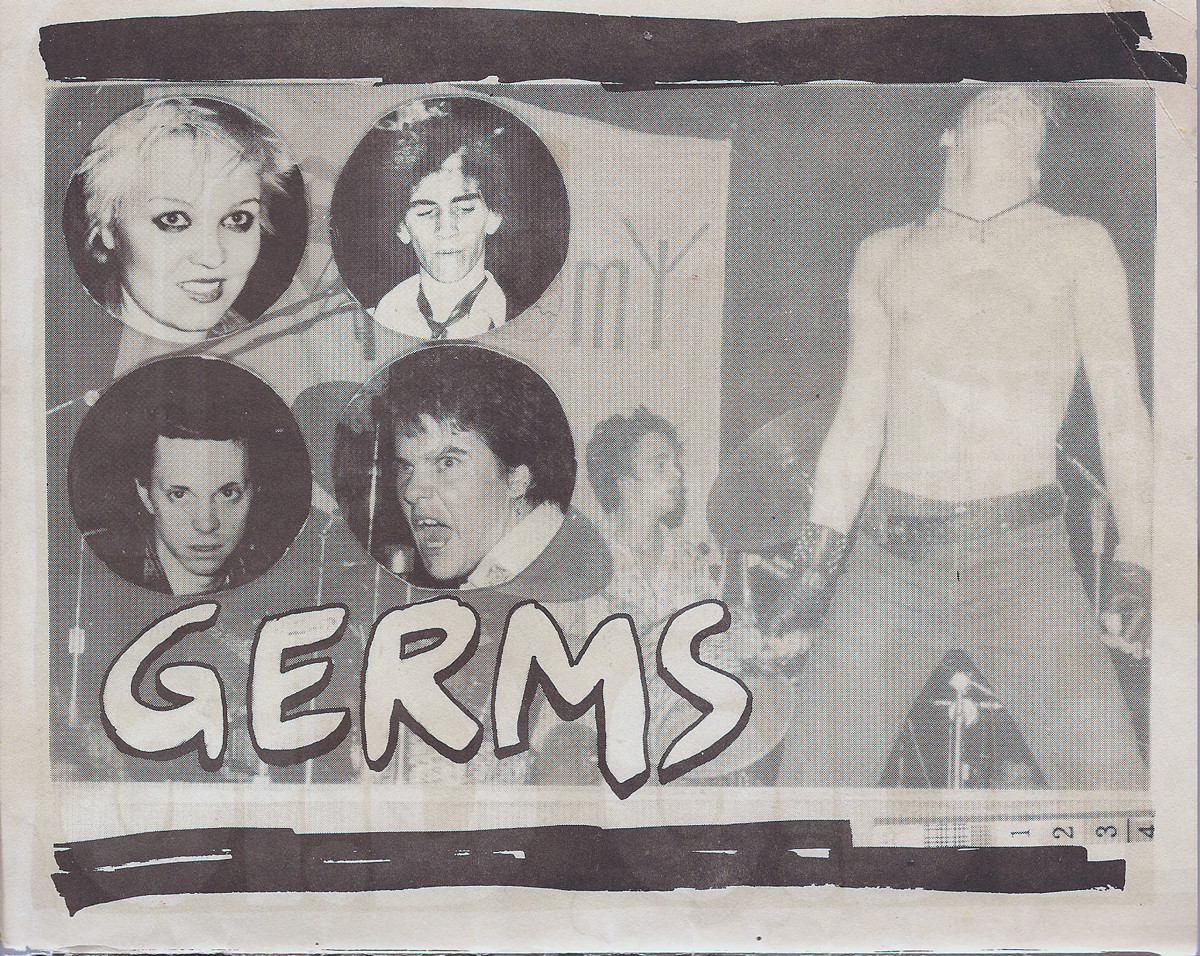 Imagen de The Germs.